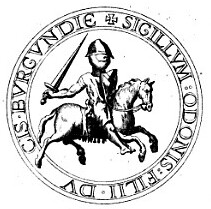 Odo III. Burgundský